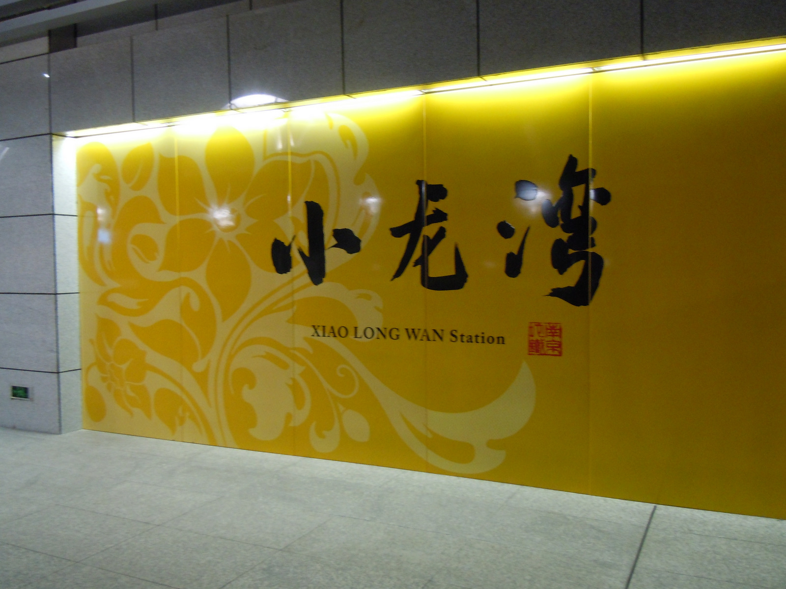 南京地铁小龙湾站站台大字壁